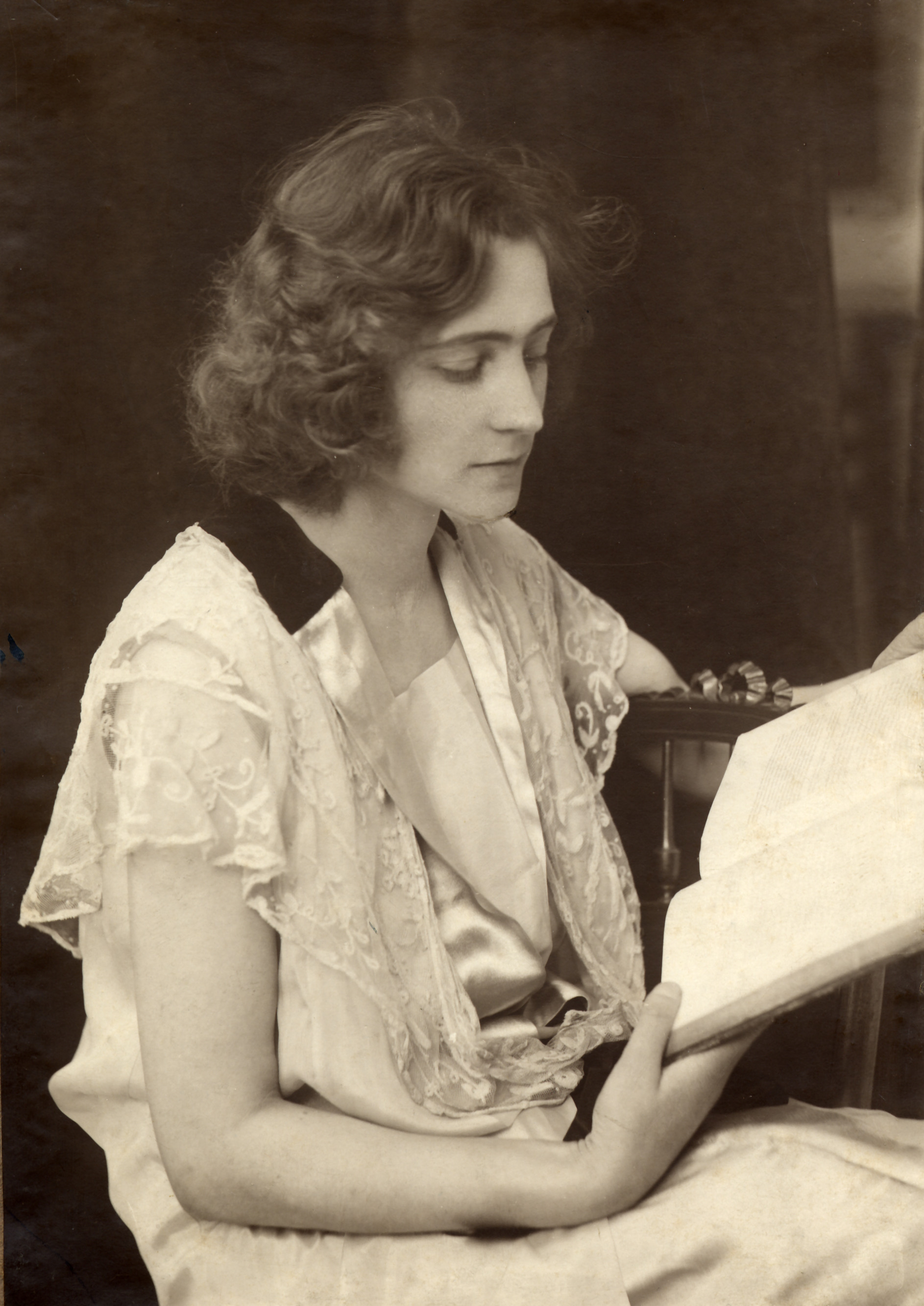 Alice Nahon aan tafel met een boek, naar rechts gericht. lhph:23115, Collectie Stad Antwerpen, Letterenhuis. Archief van Jenny van Santvoort